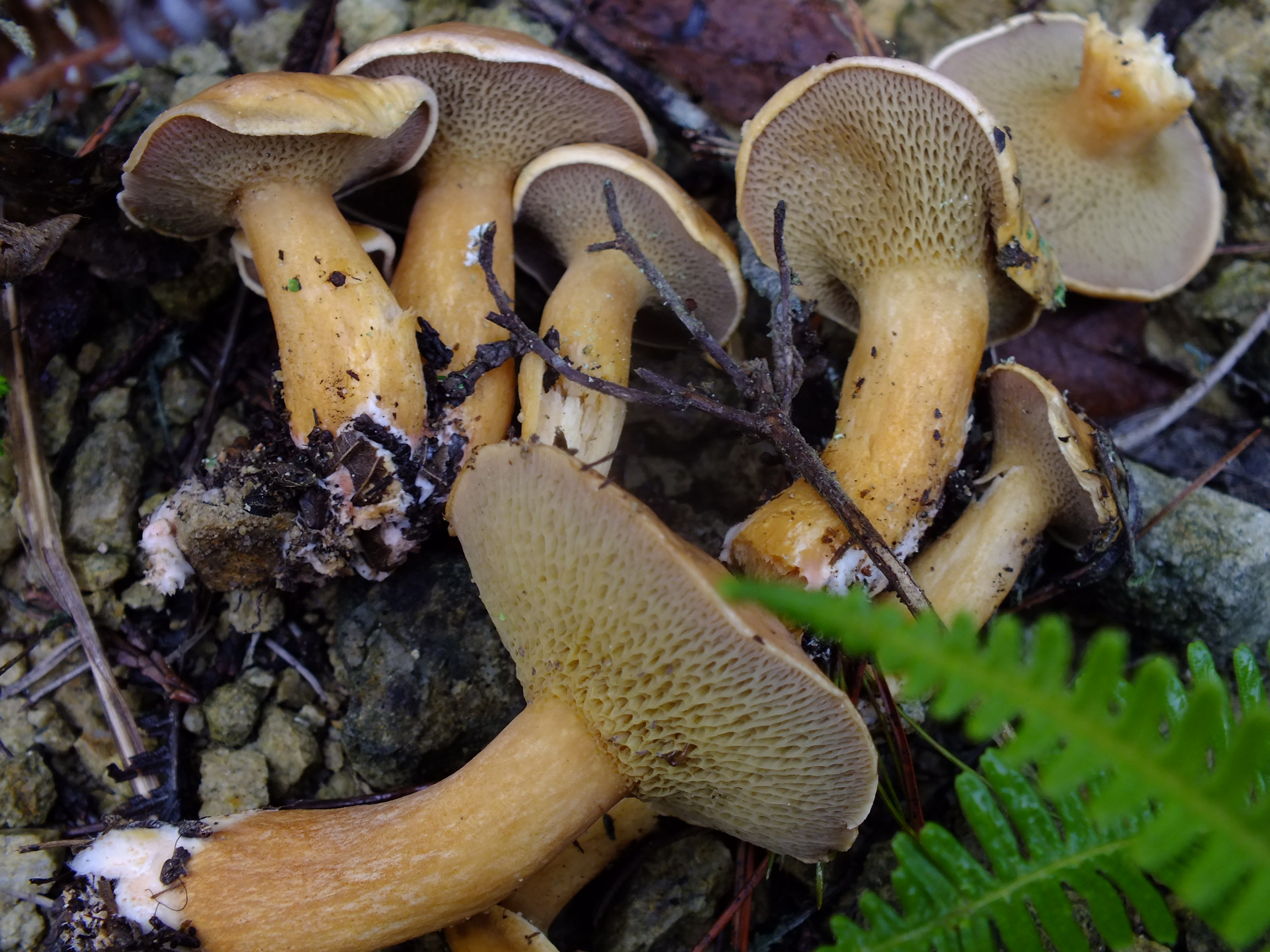 Suillus bovinus アミタケ 篠山市盃ヶ岳にて